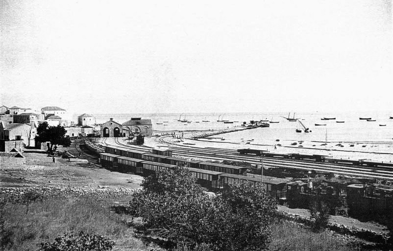 Historical images of Haifa תמונות היסטוריות של חיפה מסוף קו הרכבת החיג'אזית ברציף חיפה, 1905